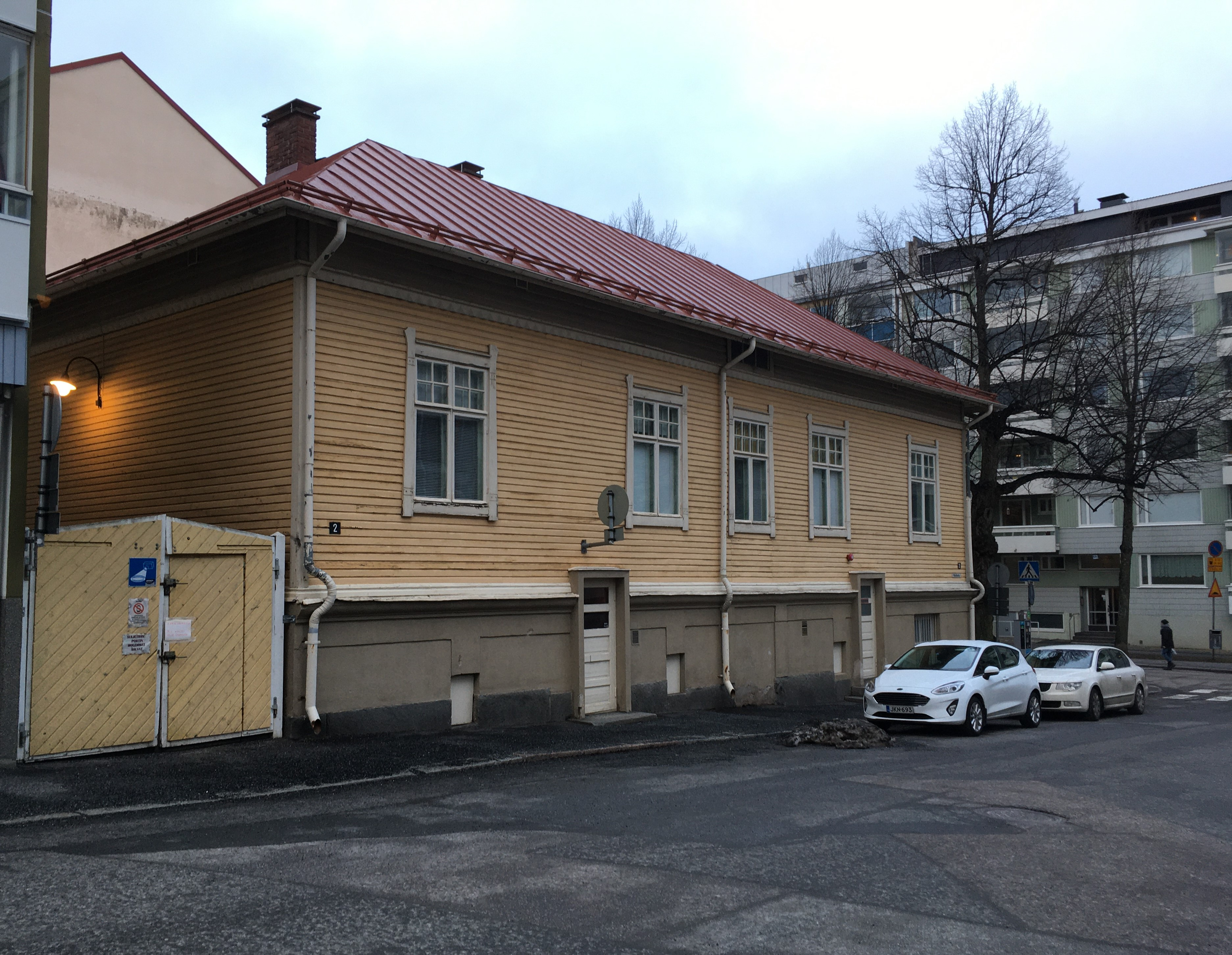 Kuvassa on tamperelainen päiväkoti, joka sijaitsee Kaakinmaan kaupunginosassa Koulukadun ja Ristikadun kulmassa. Talo on Heikki Tiitolan suunnittelema, ja se on rakennettu vuonna 1904. Tiloissa toimi yksityinen sairaala vuosina 1904–1918.